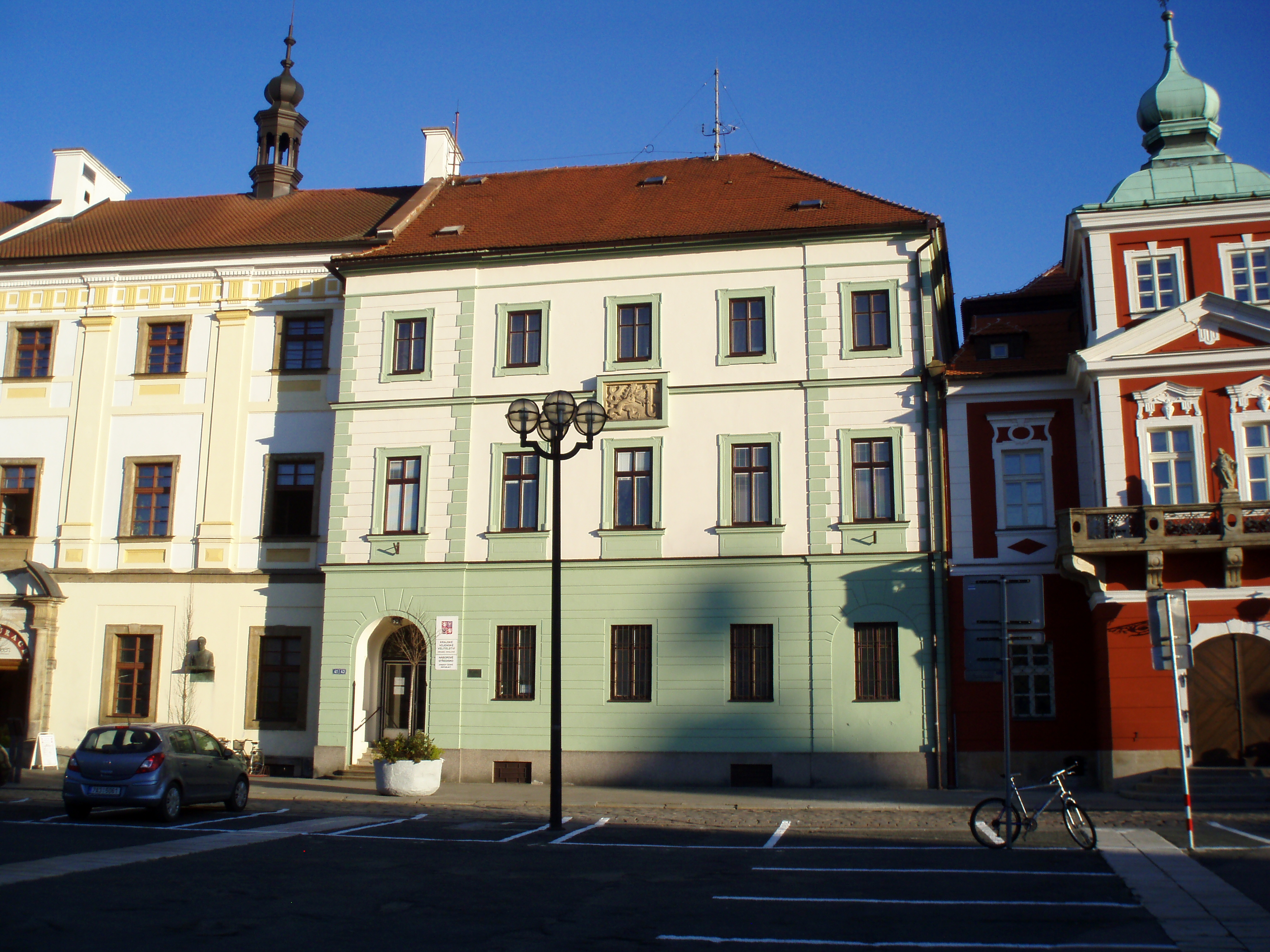 Velké náměstí čp. 33 (Hradec Králové)